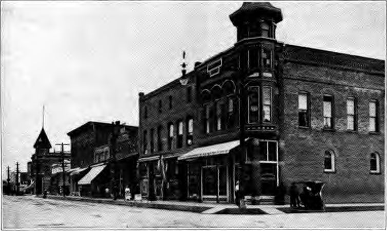 Independence, Oregon circa 1920